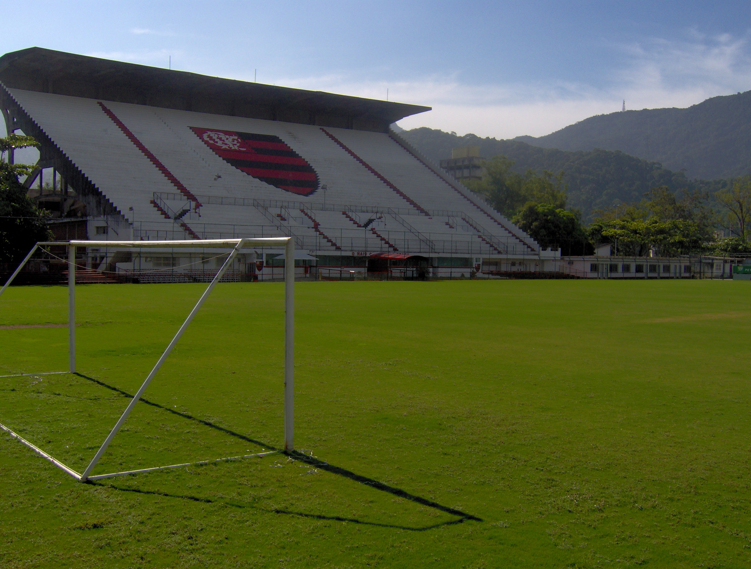 Estádio da Gávea. Campo do Clube de Regatas do Flamengo.